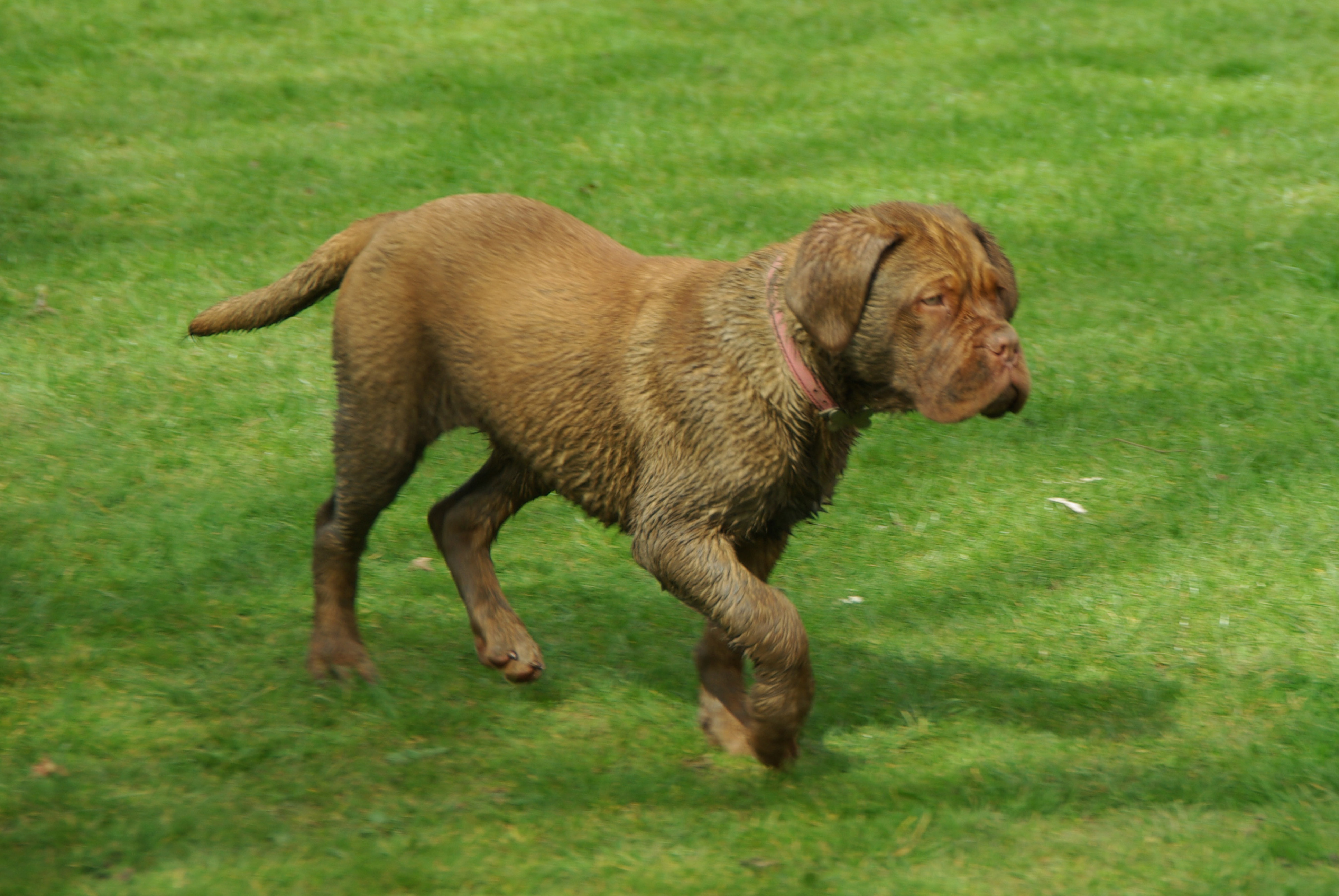 Dogue de Bordeaux Pup